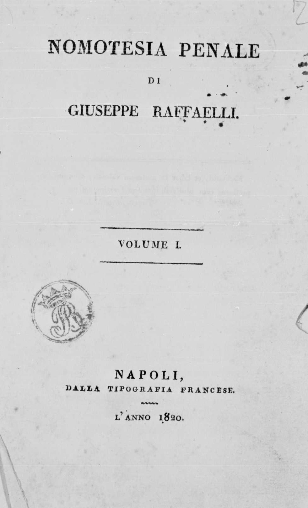 Frontespizio